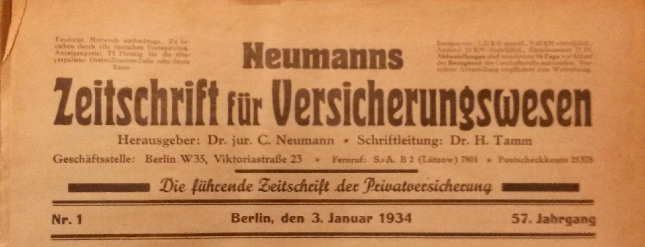 Head of Neumanns Zeitschrift für Versicherungswesen